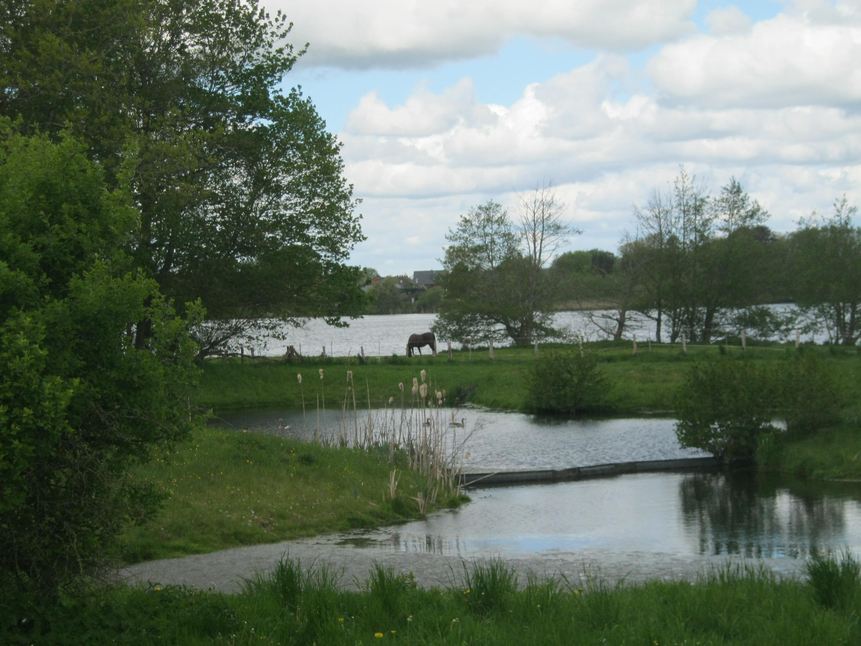 Schülldorfer See, davor ein Regenrückhaltebecken